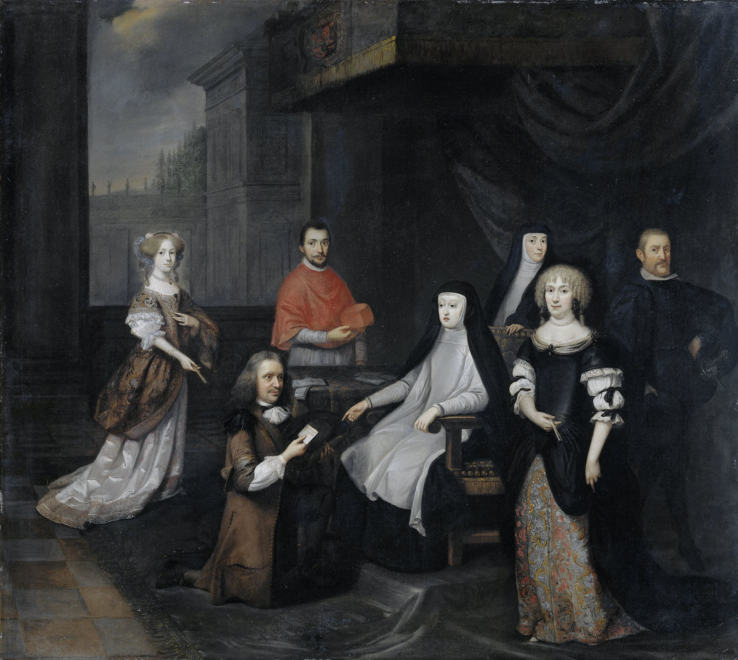 Hiëronymus van Beverningh in audiëntie ontvangen door de Spaanse koningin-regentes Maria-Anna van Oostenrijk